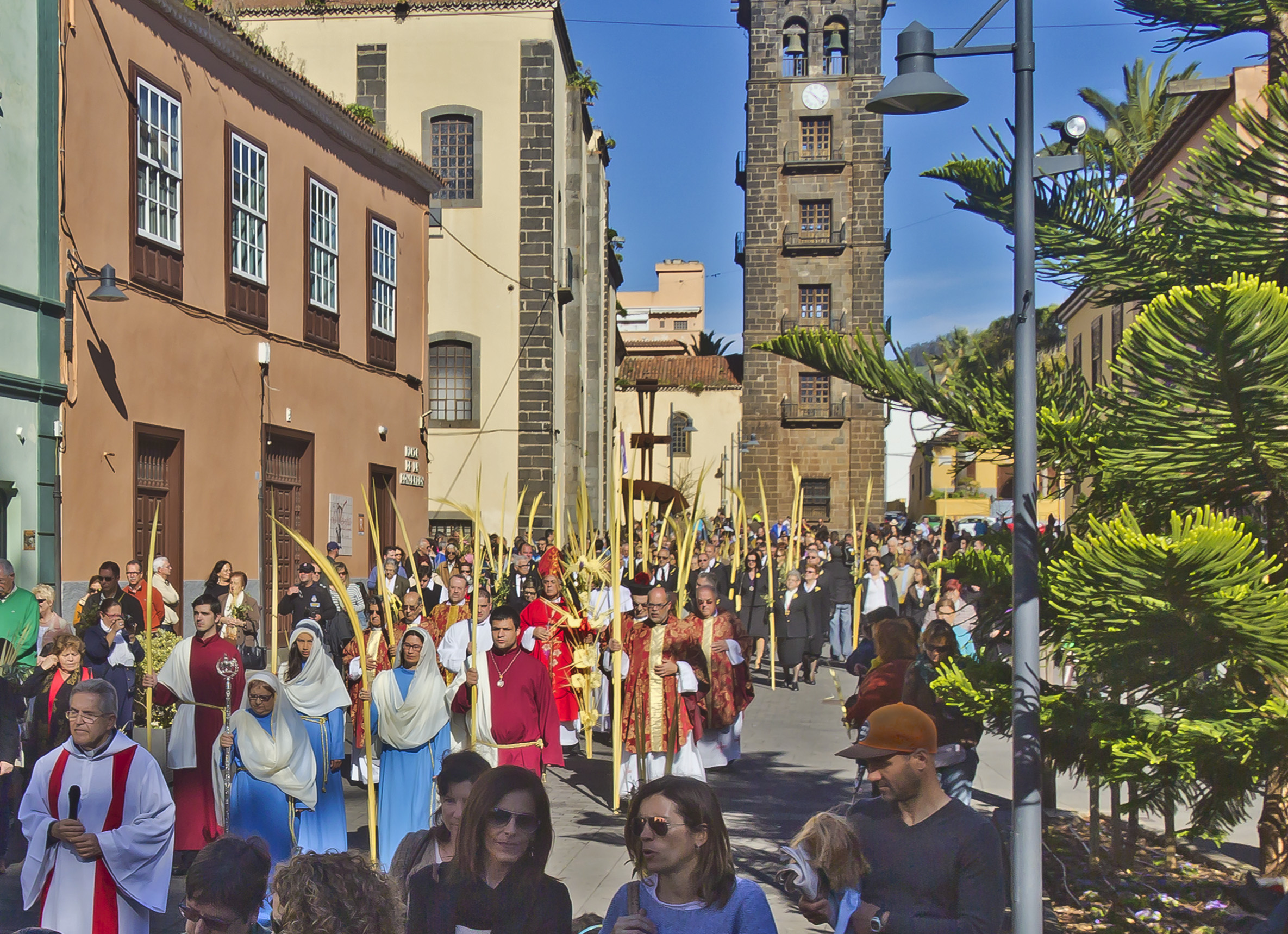 Procesión Solemne de Ramos, hasta la Santa Iglesia Catedral